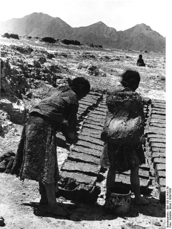 Schigatse, Bausteine werden aus Lehm geformt